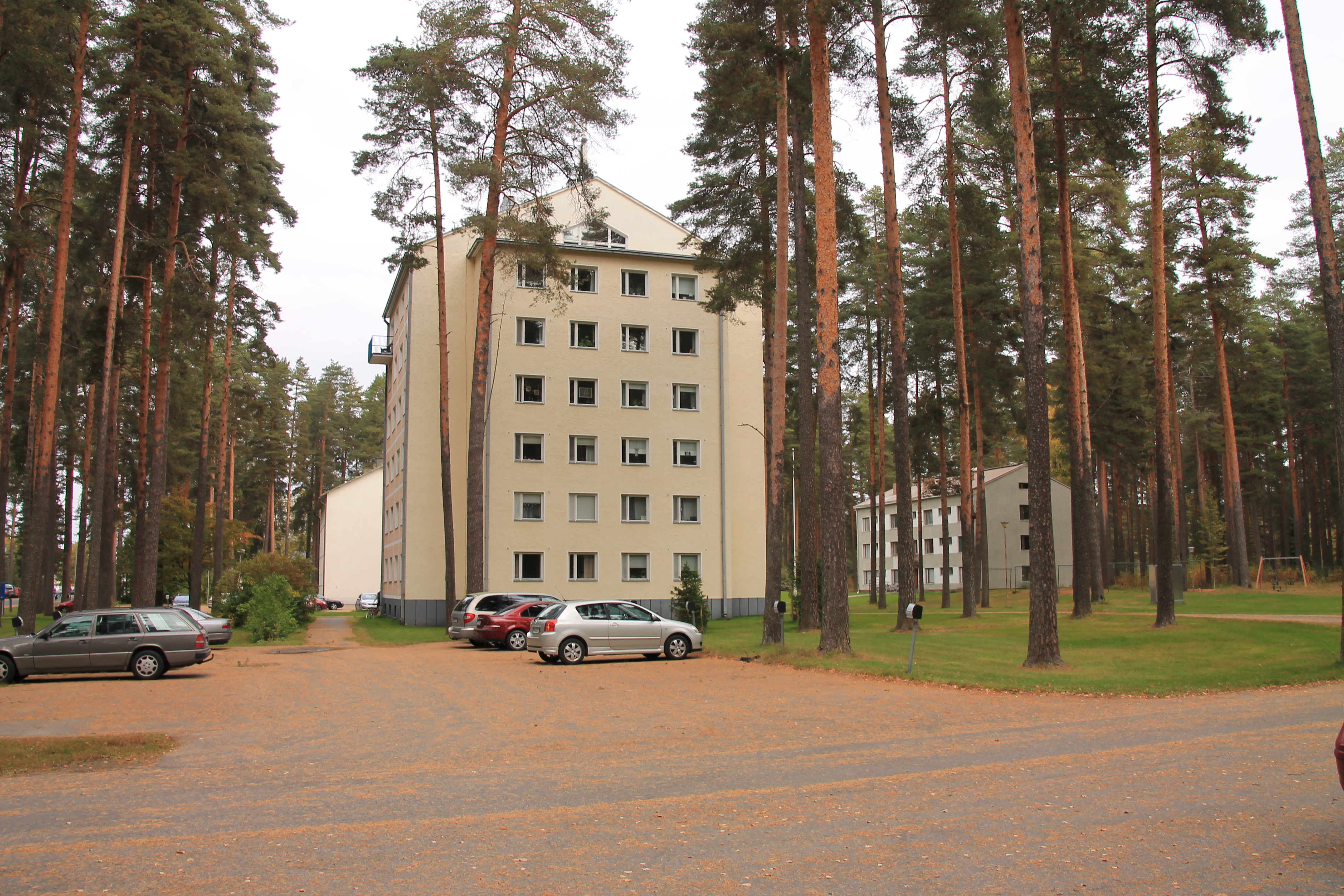 Niuvanniemen sairaalan asuntola-aluetta.